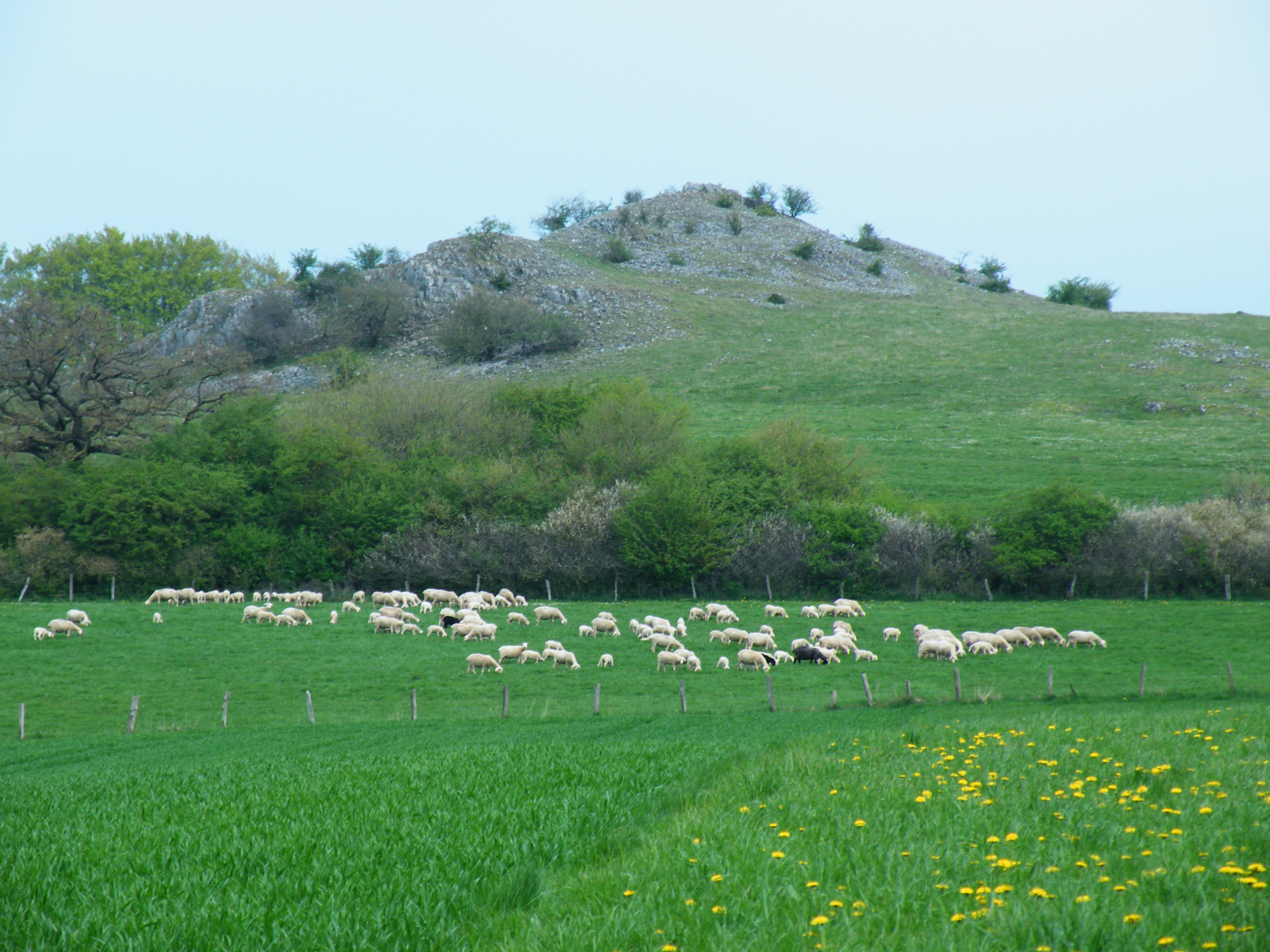 Bereich Kalberstert des Naturschutzgebietes Scheffelberg/Kalberstert von Südwesten mit Schafherde.